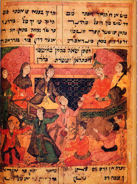 אסתר ואחשוורוש בגרסה מאוירת של "ארדשיר-נאמה" מהמאה ה-17 A page from an illustrated version of Shahin's ArdshirNama, a Judeo-Prsian epic poem about Purim and by the Jewish-Persian 14th century poet Shahin.